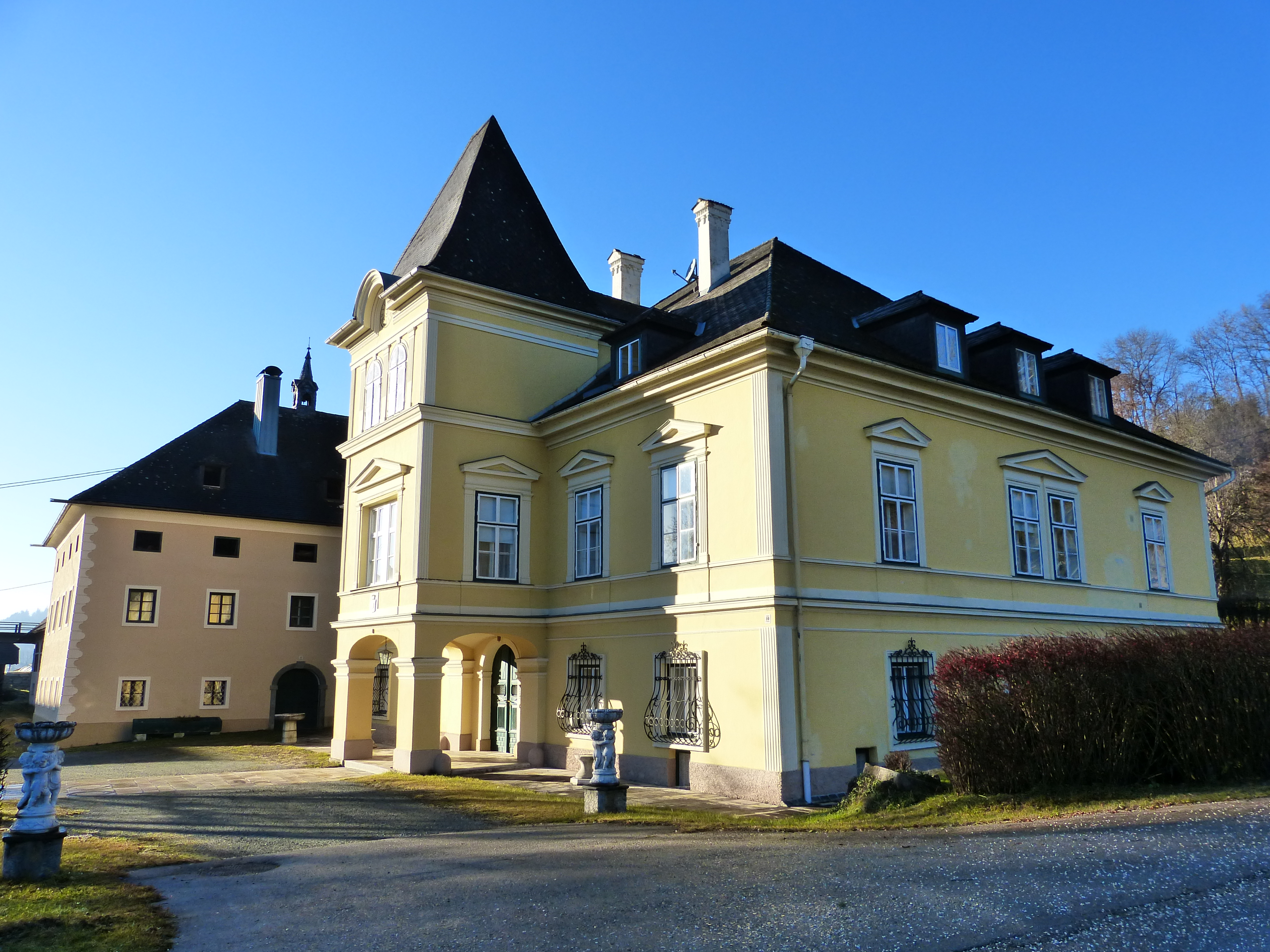 Anwesen Wutte, in Lebmach (Gemeinde Liebenfels, Bezirk St. Veit an der Glan): im Vordergrund Herrenhaus ("Schloss"), 2. H. 19. Jhdt. im Hintergrund wuchtiges Gebäude von Anfang des 16. Jhdts.